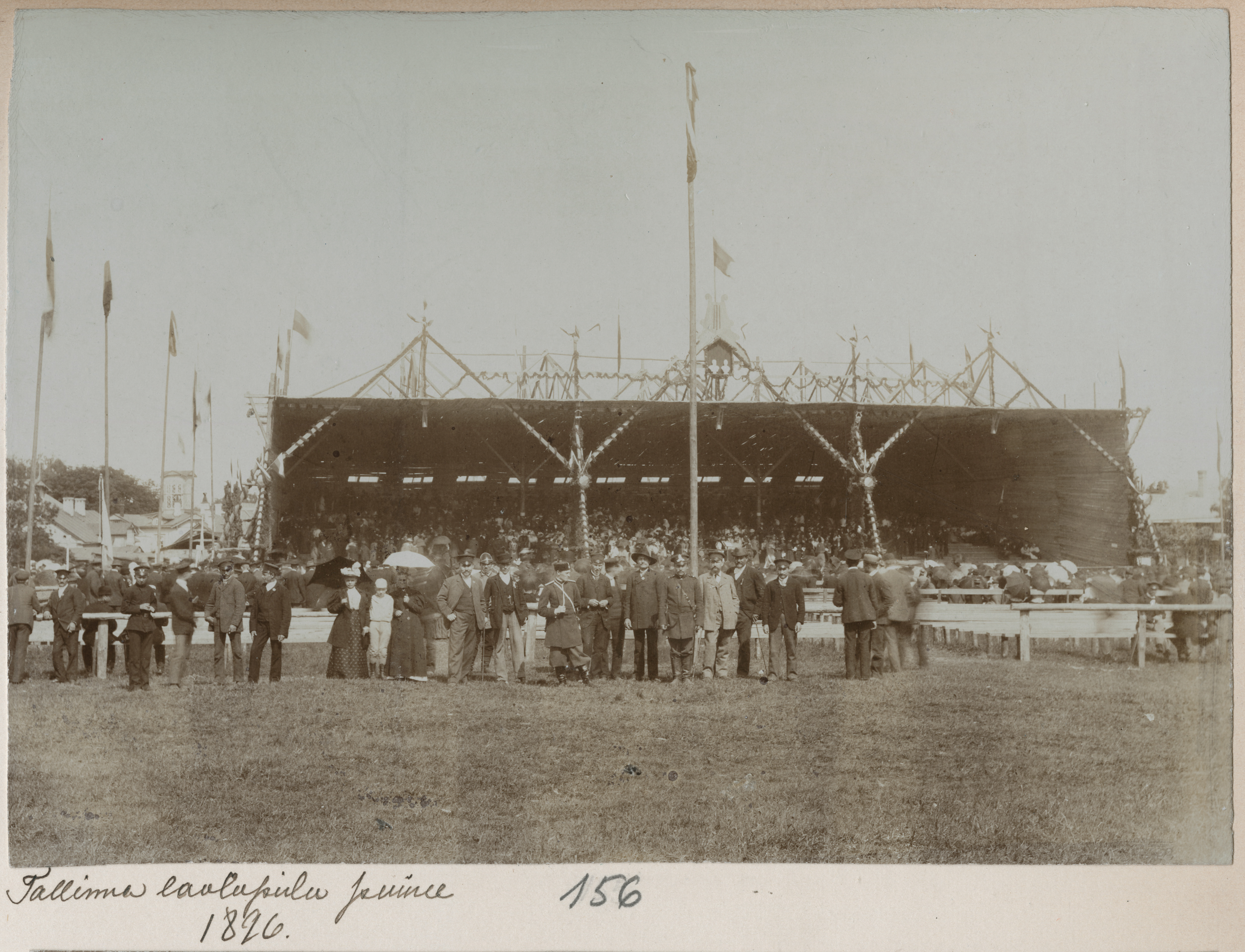 Tallinna laulupidu püüne 1896